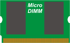 Micro-DIMM-Ram Modul M1:1